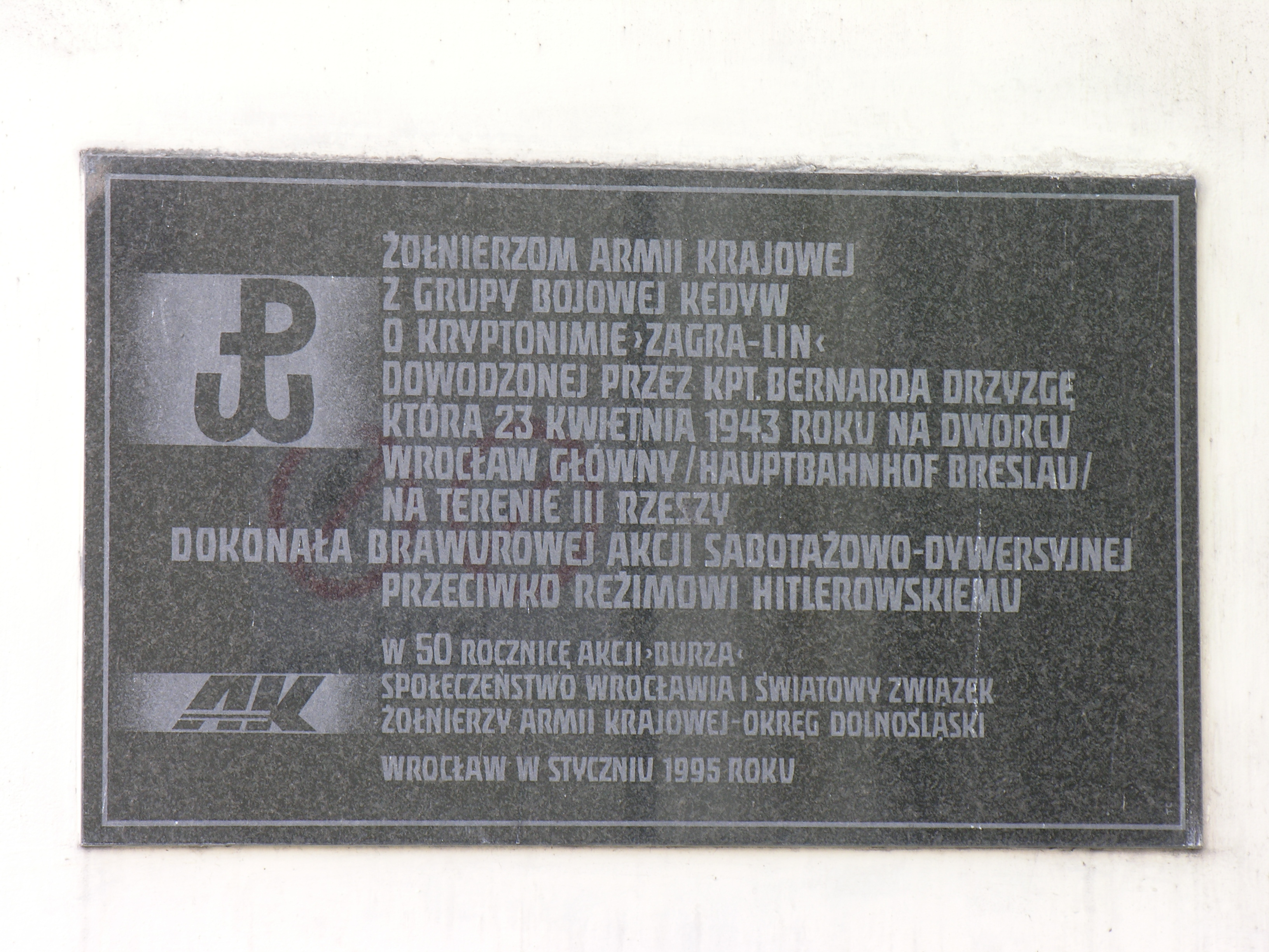 Tablica pamiątkowa przed gółwnym wejście do dworca Wrocław Główny